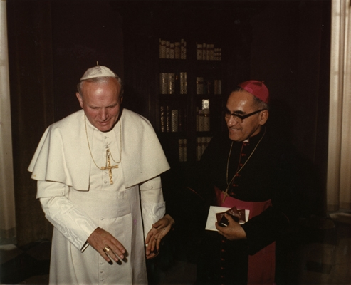 Monseñor Romero yl papa Juan Pablo II saliendo de una reunión privada en el Vaticano, unos meses después de asceder al trono pontificio.